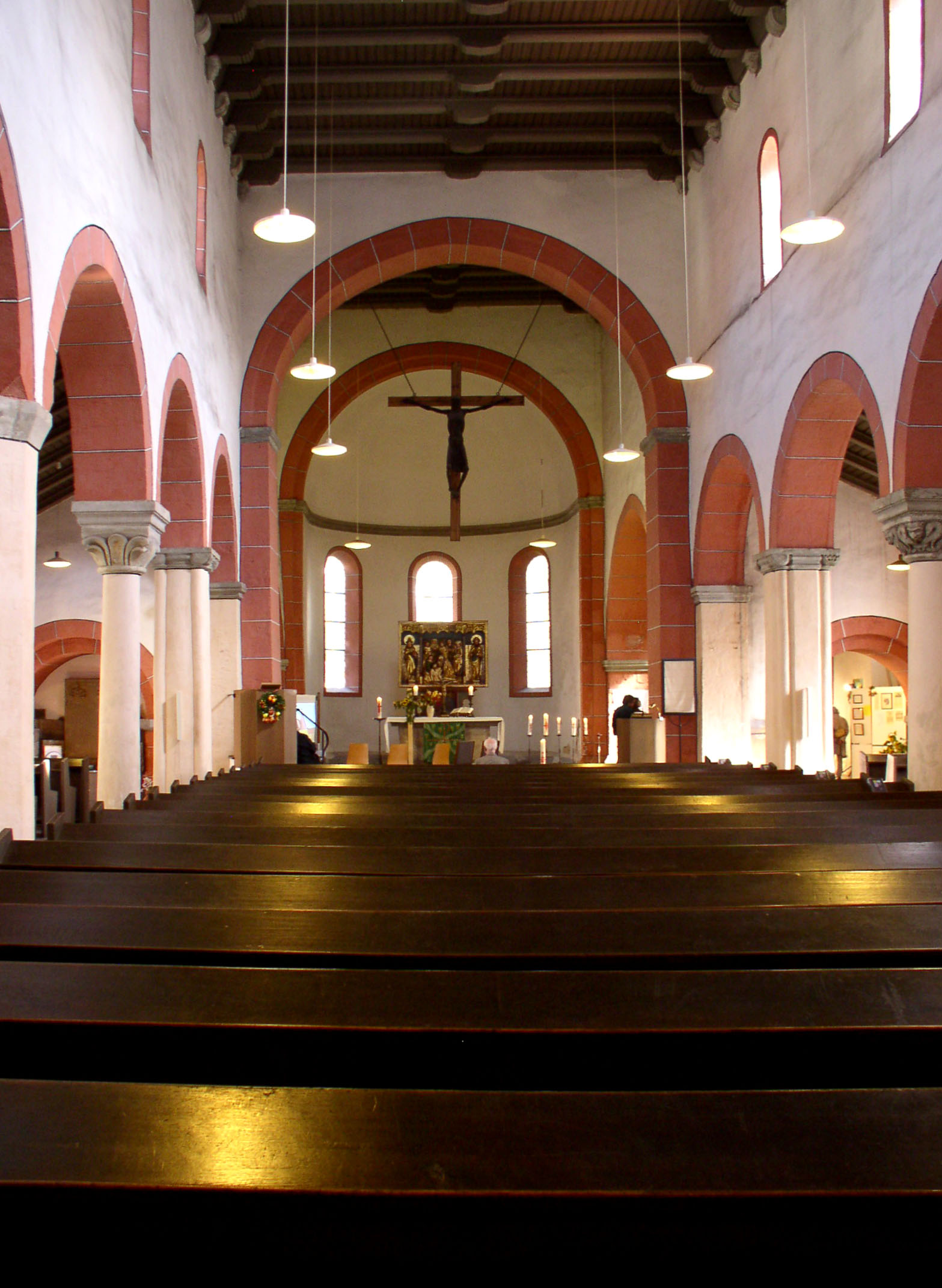 Nikolaikirche Innenansicht